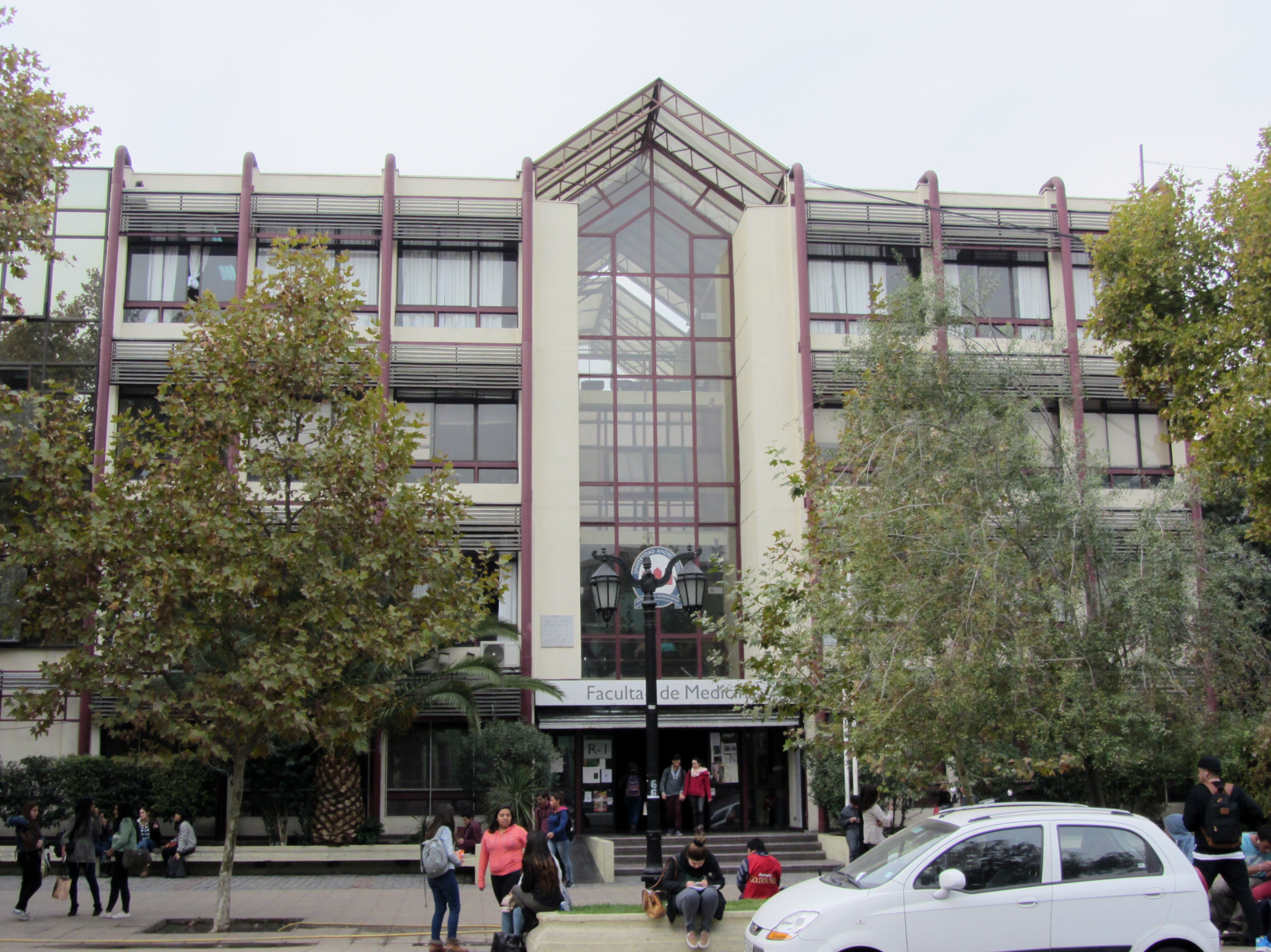 Facultad de Medicina de la Universidad Andrés Bello en avenida República